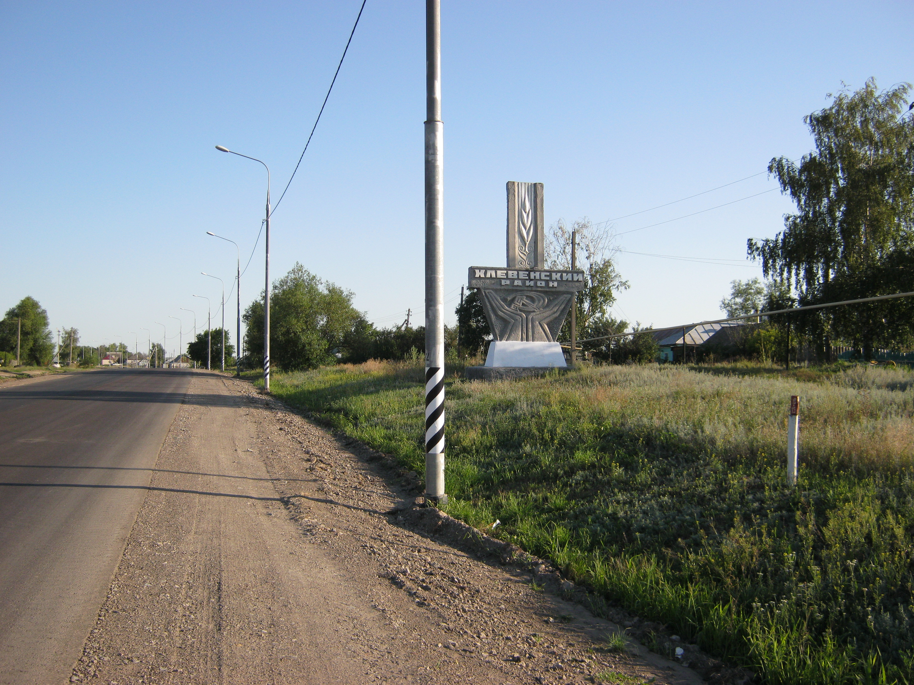 Липецкая область. Въезд в Хлевенский район из Задонского района